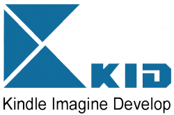 Logotype for KID.